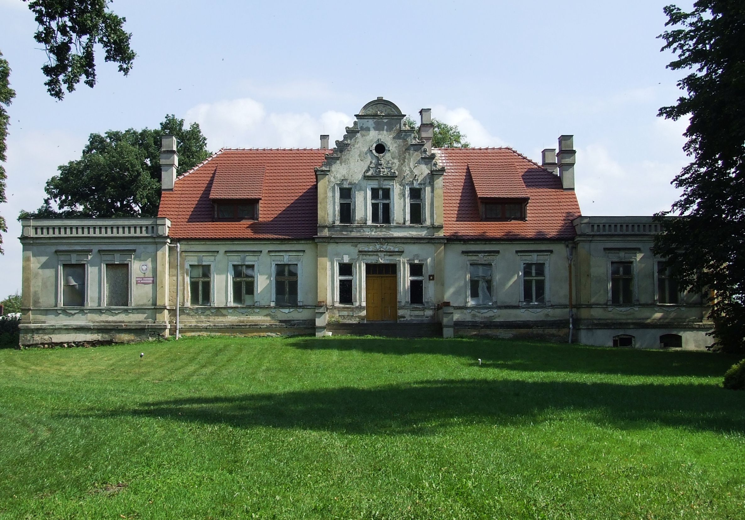 Węgorzewo - zespół dworski: dwór z 1. połowy XIX w., pocz. XX w.